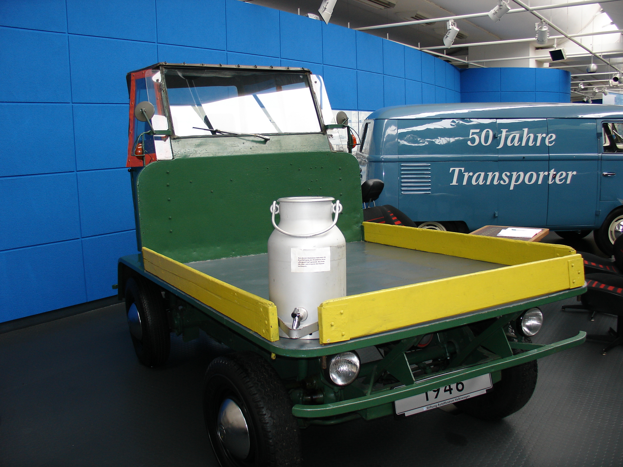 VW Palettenwagen 1947